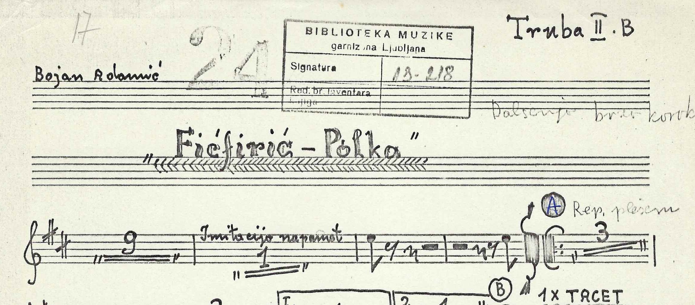 Fragment skladbe Fičfirič